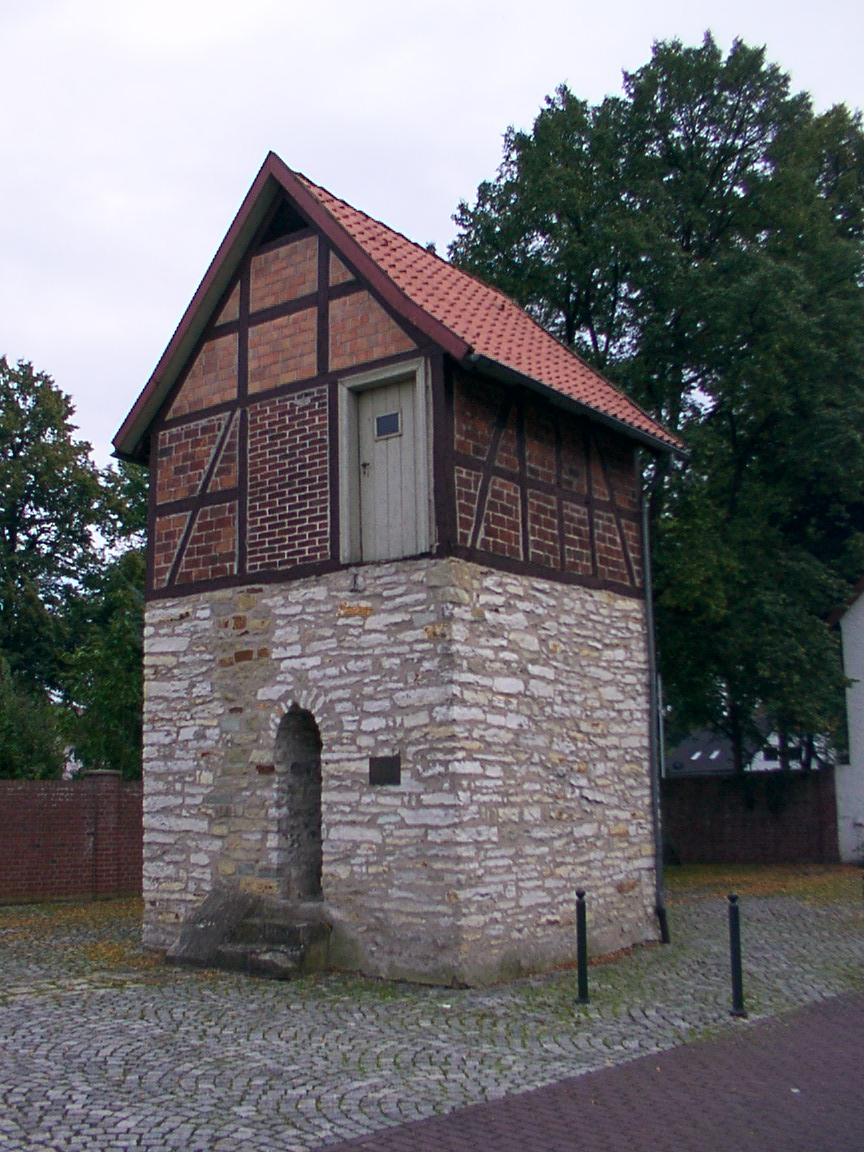 Salzkotten: Hexenturm This is a photograph of an architectural monument.